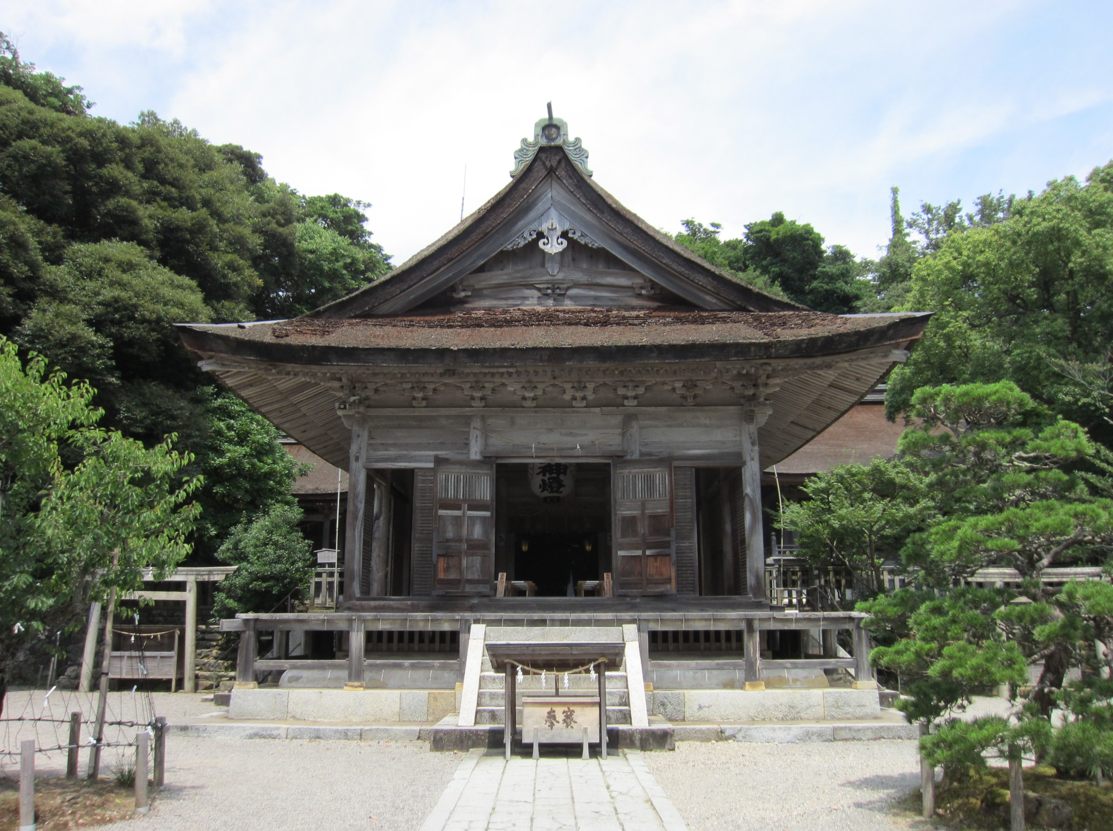 氣多大社 拝殿